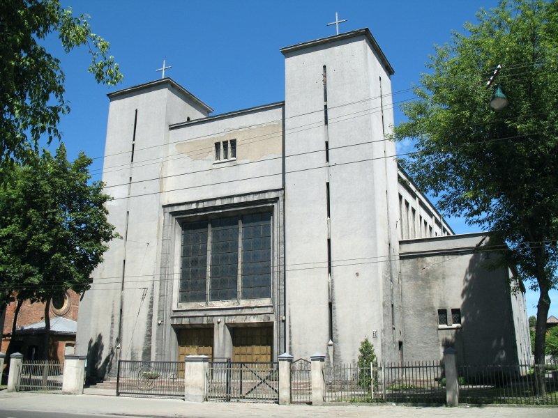 Švč. Jėzaus Širdies (Šančių) bažnyčia, Kaunas.